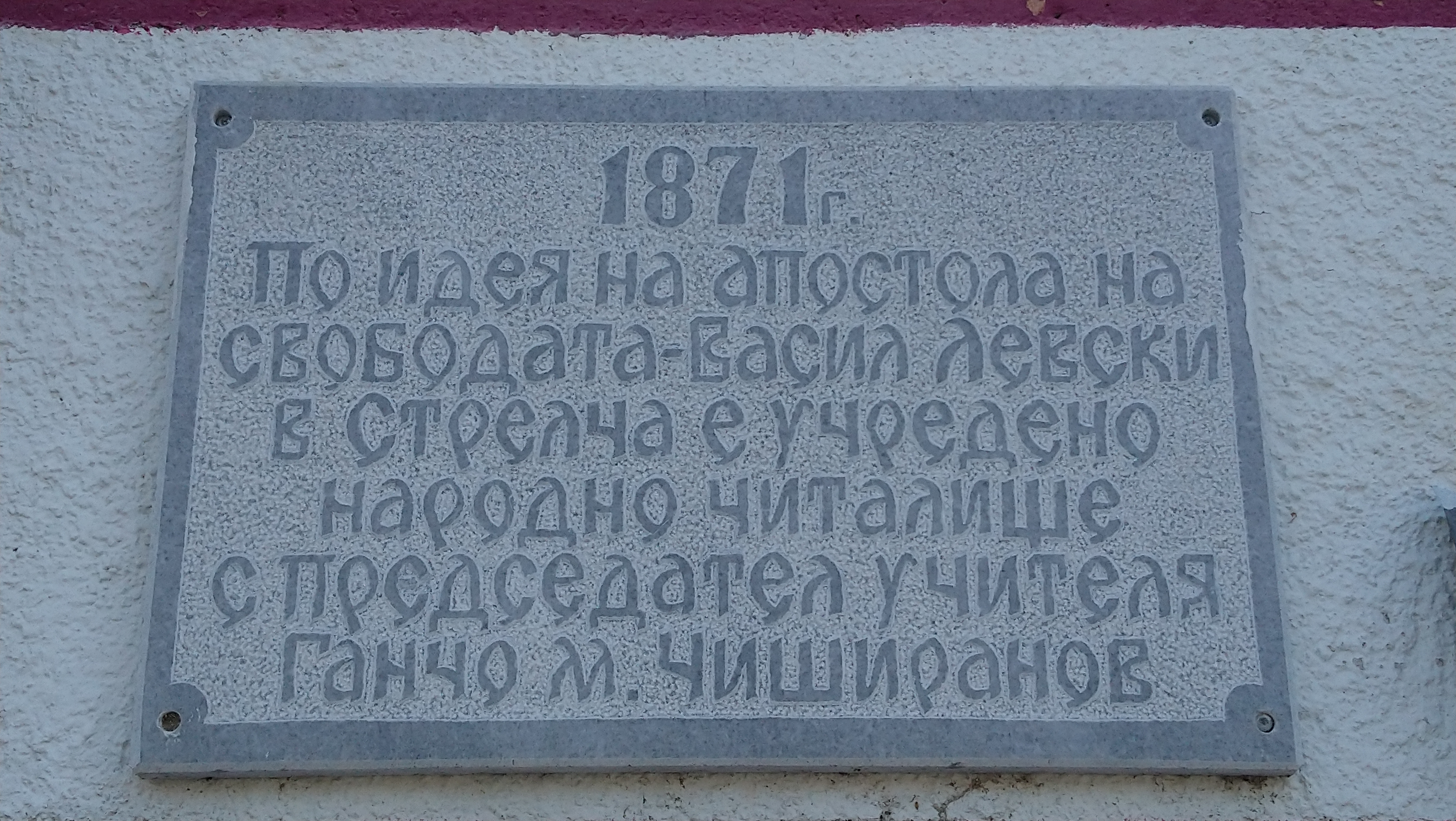 Паметна плоча на стената на читалище Просвещение 1871, град Стрелча